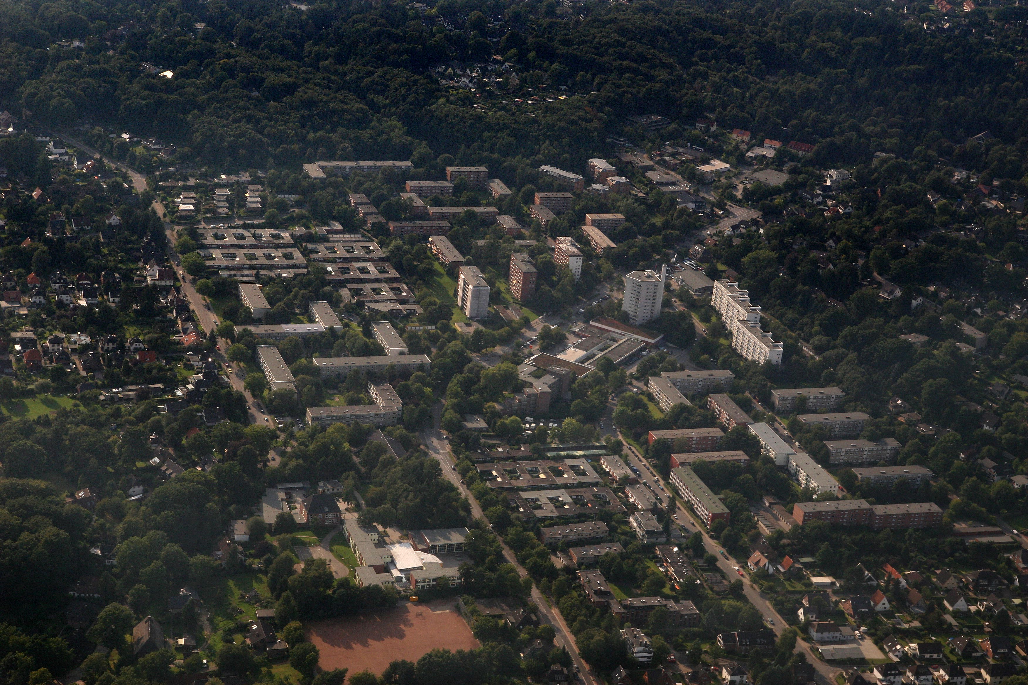 Luftbild vom "neuen" Marmstorfer Ortskern, mittig: Ernst-Bergeest-Weg, links unten: Grundschule Marmstorf